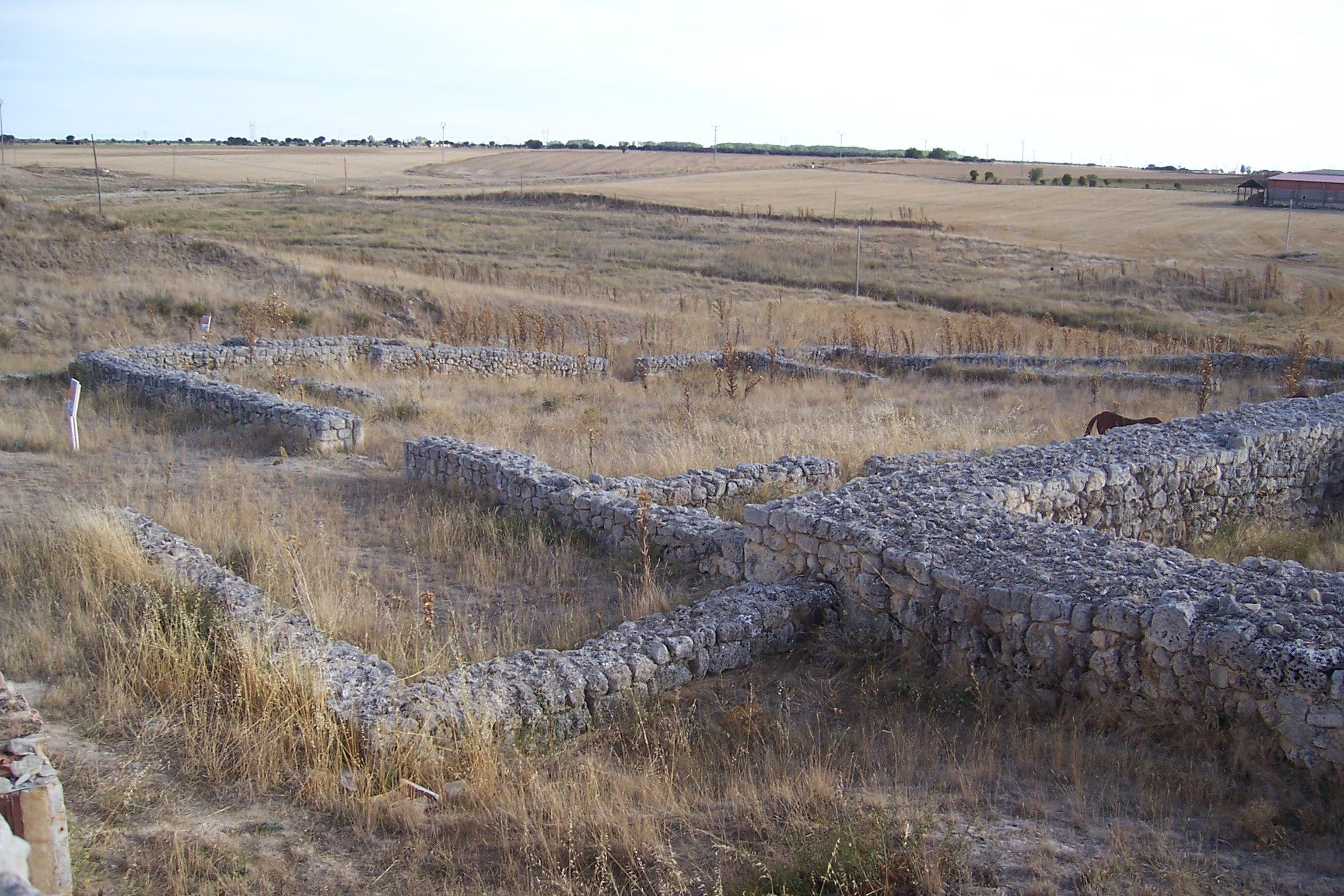 Yacimiento de un poblado medieval en Fuenteungrillo, localidad de Villalba de los Alcores, Valladolid, España. Reacreación con animales y personajes.